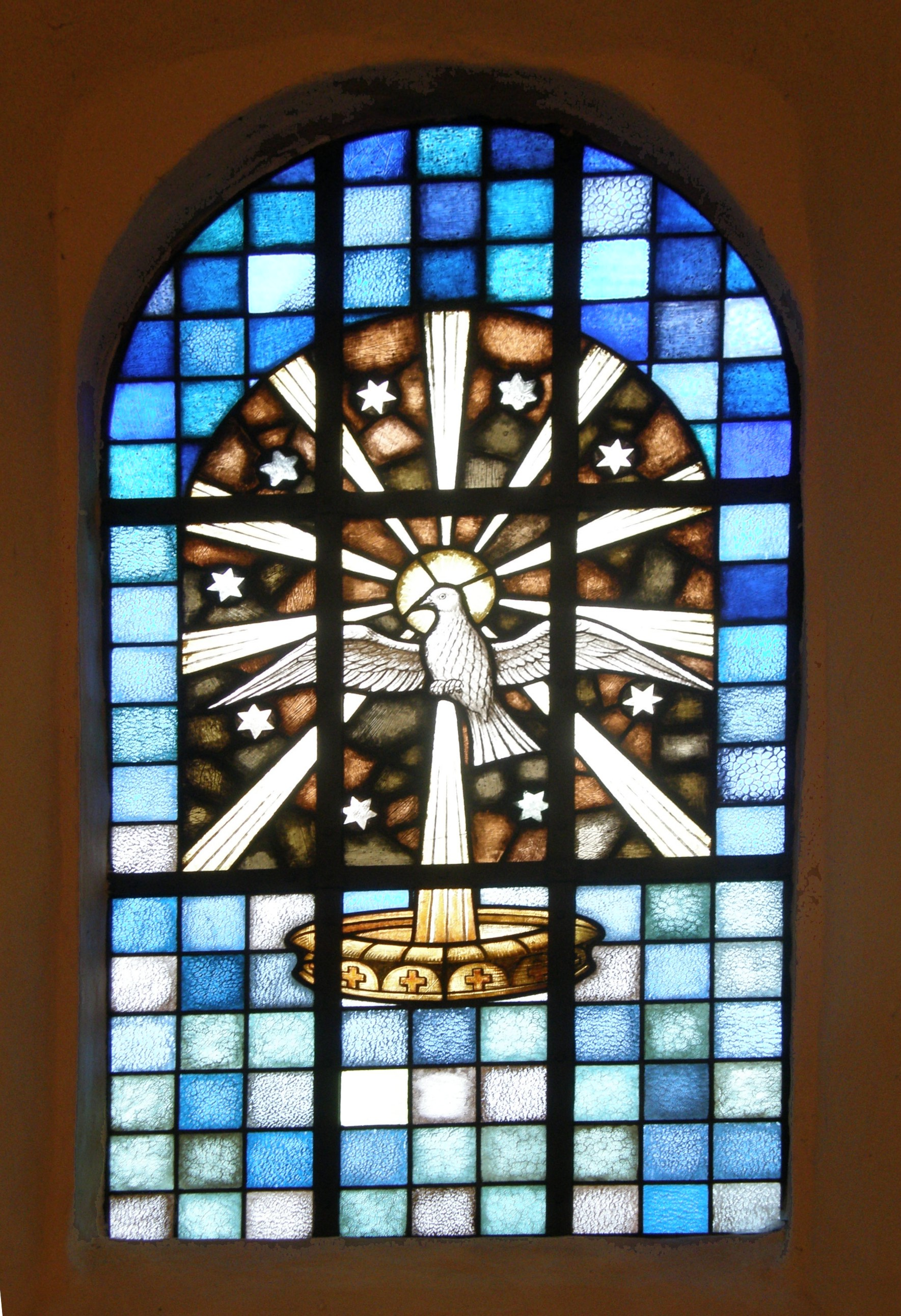 Falkenhagener Dorfkirche, Altarfenster